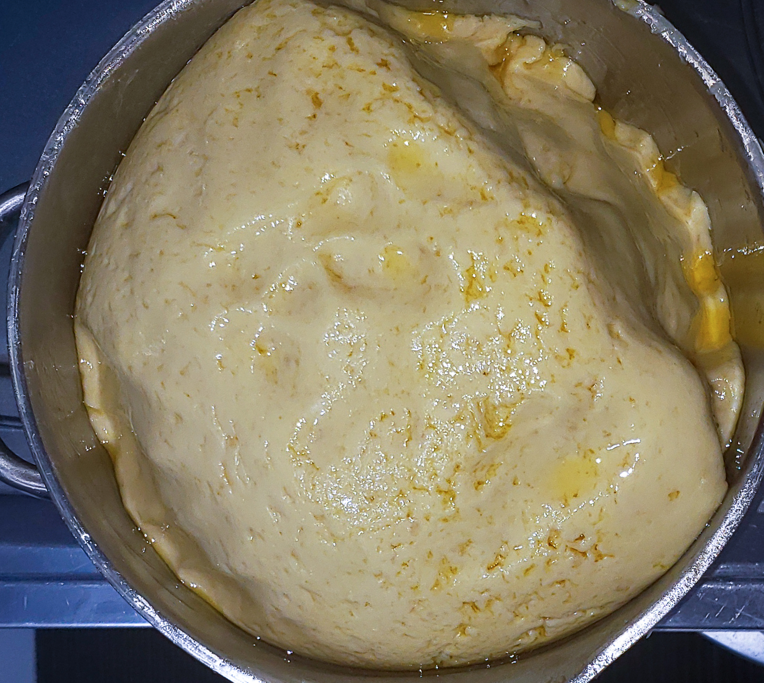 Pão de queijo